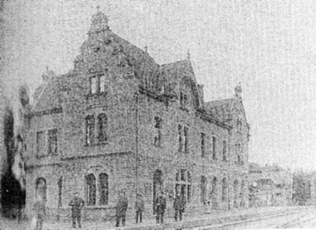 Empfangsgebäude des Bahnhofd Bergzabern kurz nach seiner Freigabe 1898